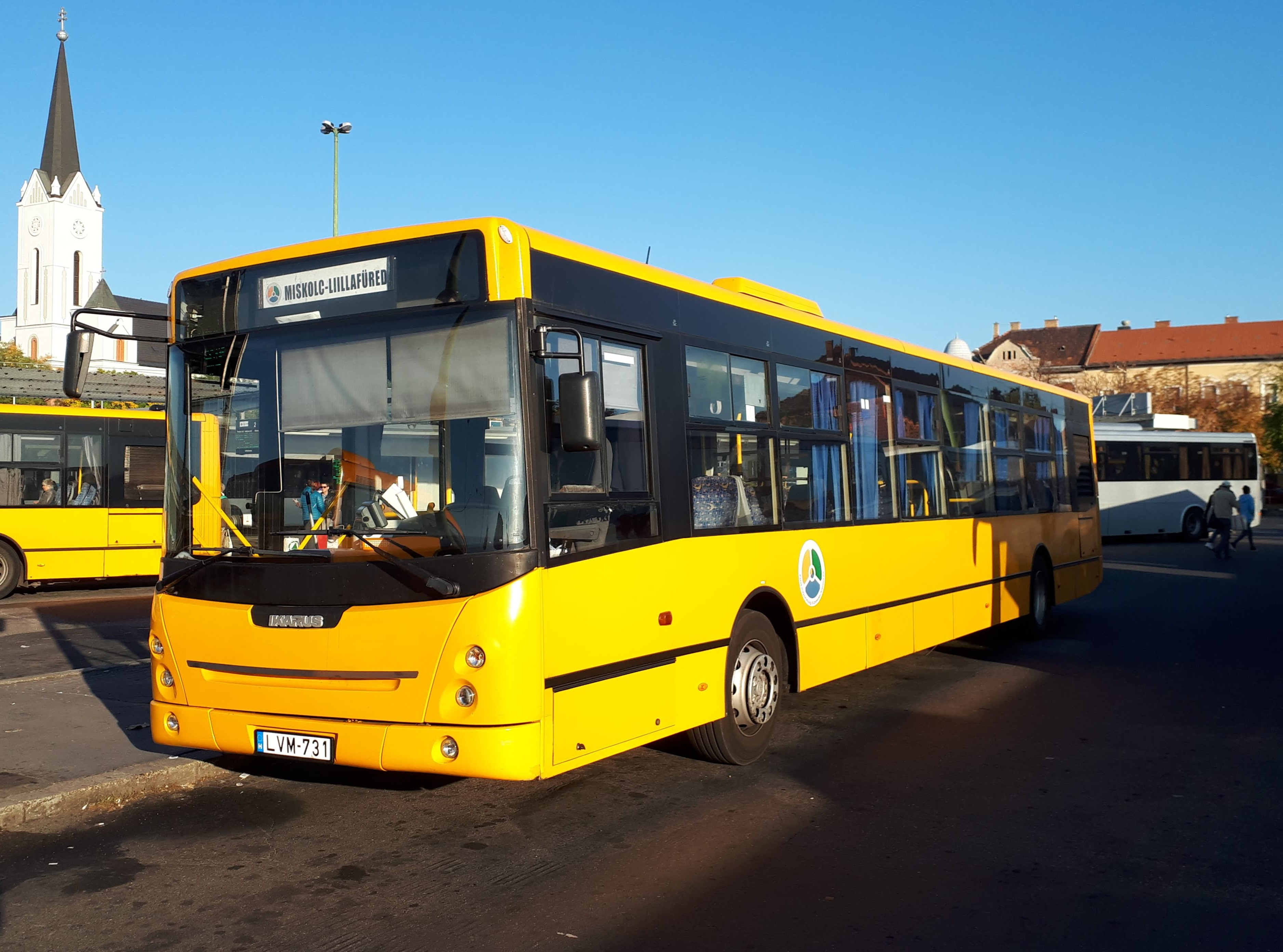 Az ÉMKK LVM-731 rendszámú Ikarus-ARC E134 típusú busza Miskolcon, a 3755-ös helyközi járaton.